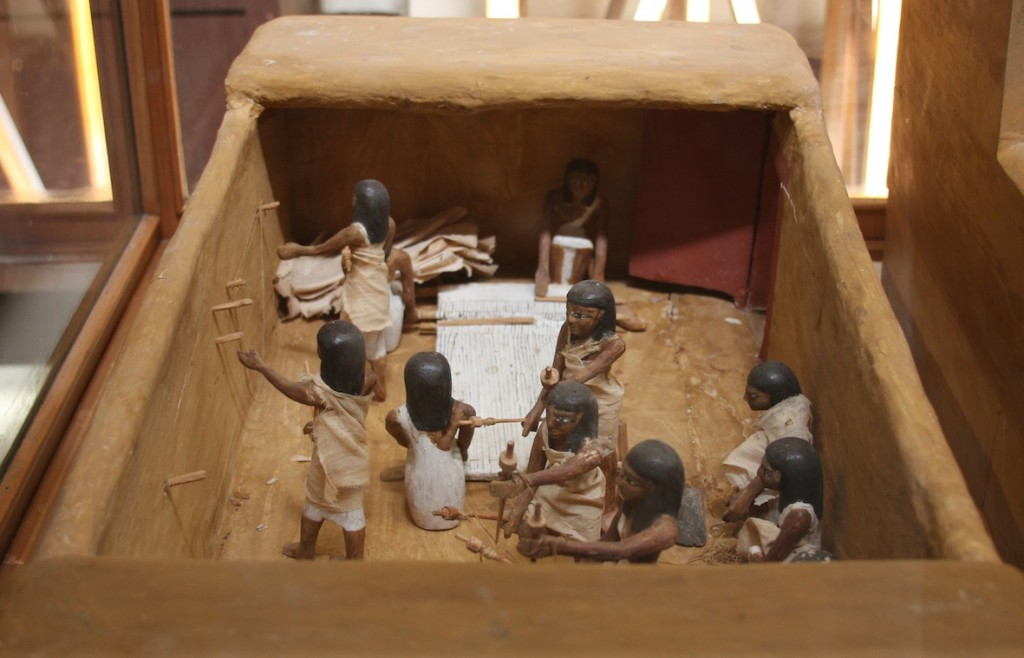 Maquette d'un atelier de tissage découvert dans la tombe de Meketrê (11e dynastie).